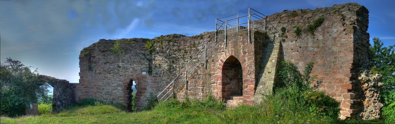 Burgruine Frauenberg bei Marburg